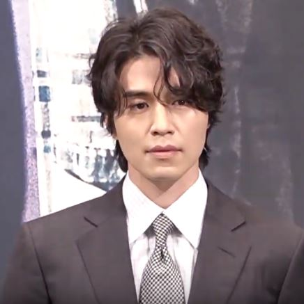 28일 오후 서울 논현동 임피리얼팰리스서울 호텔에서 OCN '타인은 지옥이다' 제작발표회가 열렸다.